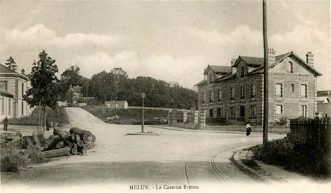 La place et la caserne Breton. On distingue les rails du tramway venant de la rue des Marais et s'apprêtant à traverser l'Almont s'où est pris cette vue avant 1904.